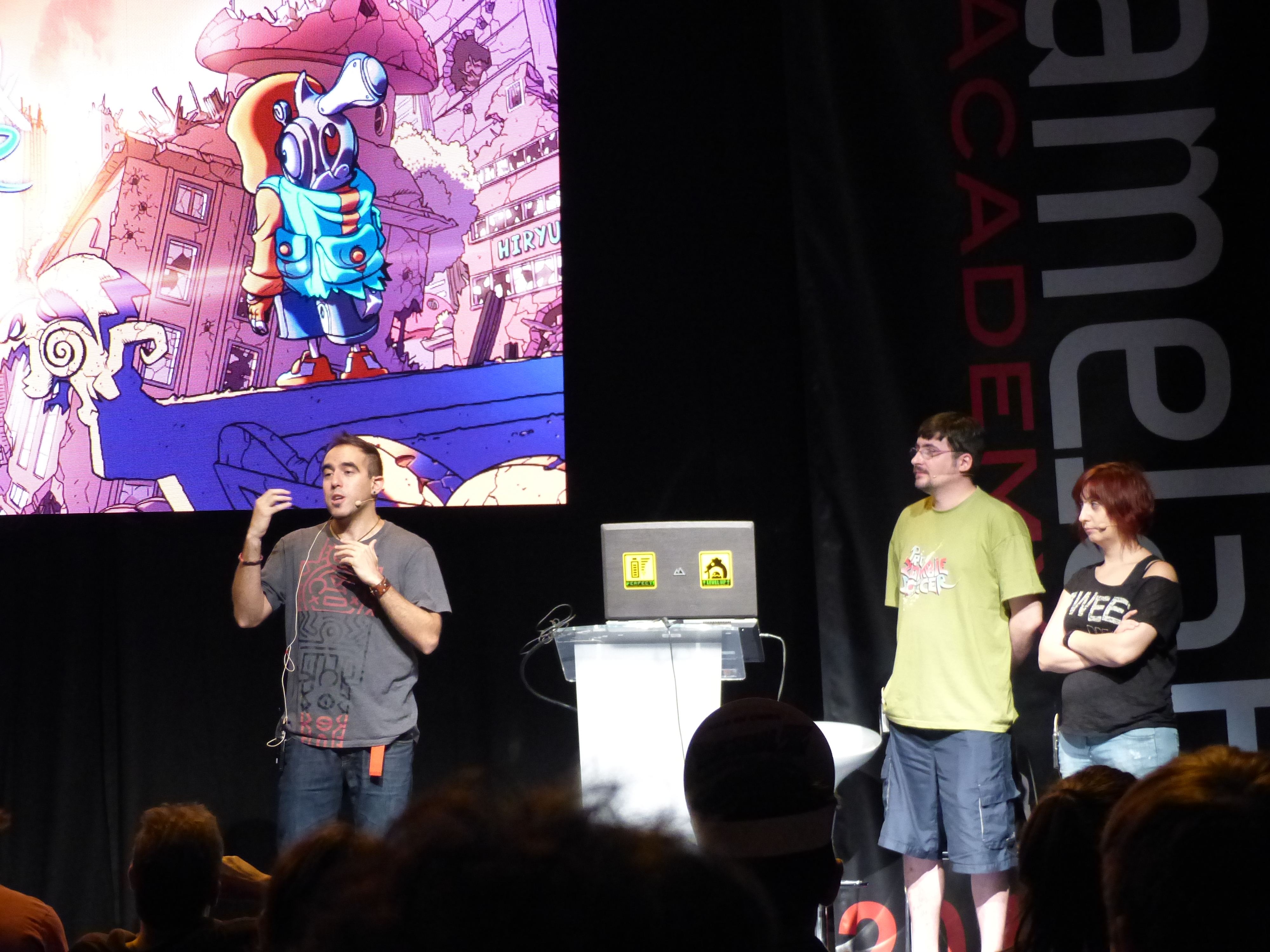 Madrid Games Week, Super Mega Team.